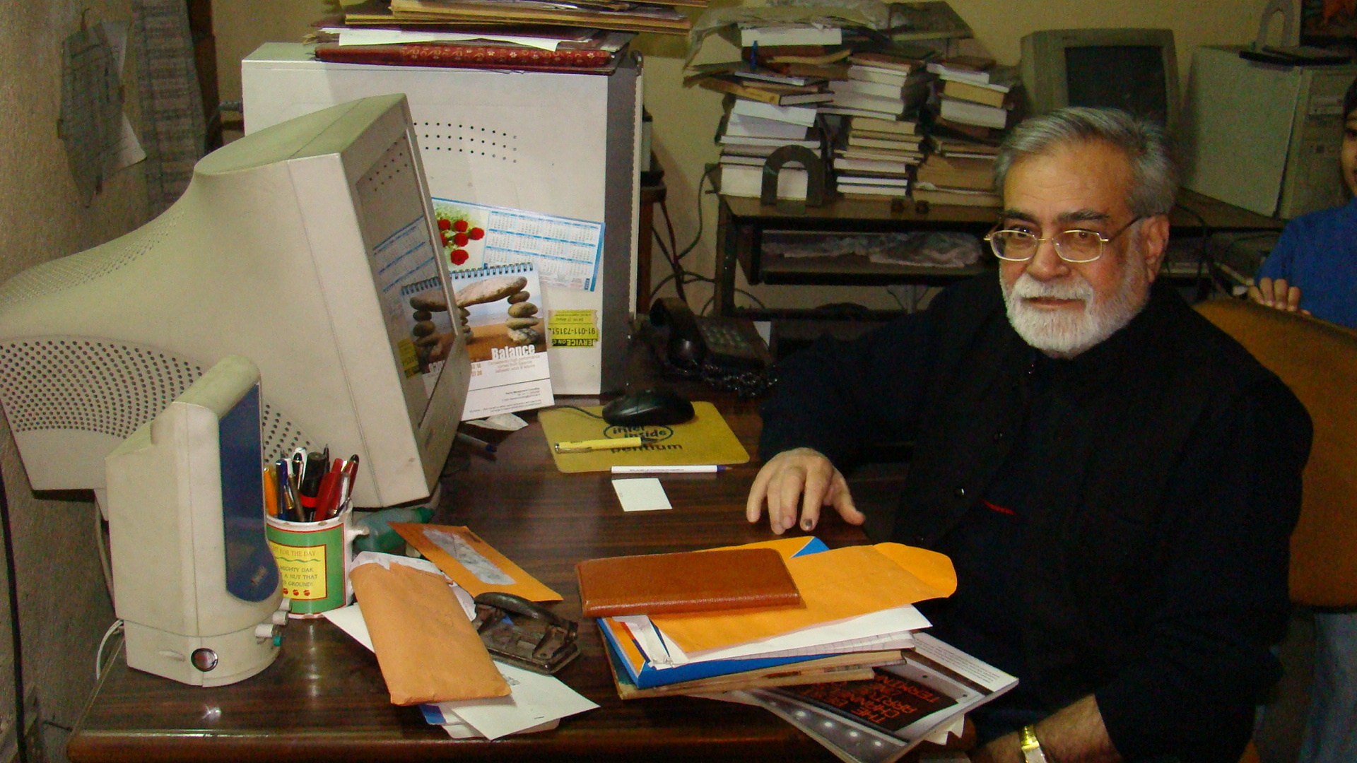 कालजयी कथाकार एवं मनीषी डॉक्टर. नरेन्द्र कोहली : साहित्य सृजन की साक्षी अपनी मेज़ पर